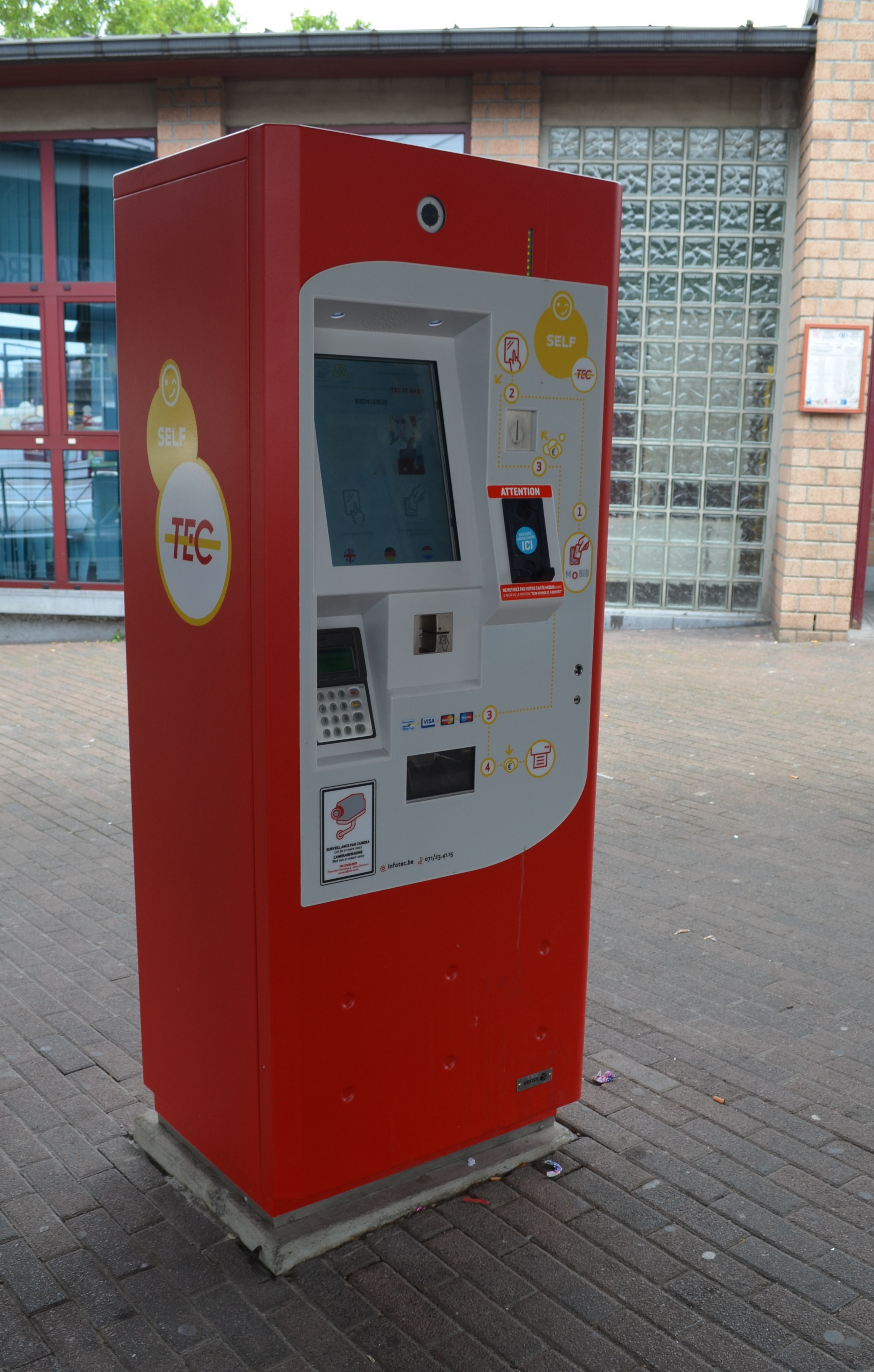 Self-TEC. Distributeur automatique de titres de transport des TEC en Wallonie. Modèle depuis la mise en place du titre de transport électronique au format de carte à puce sans contact MoBIB.